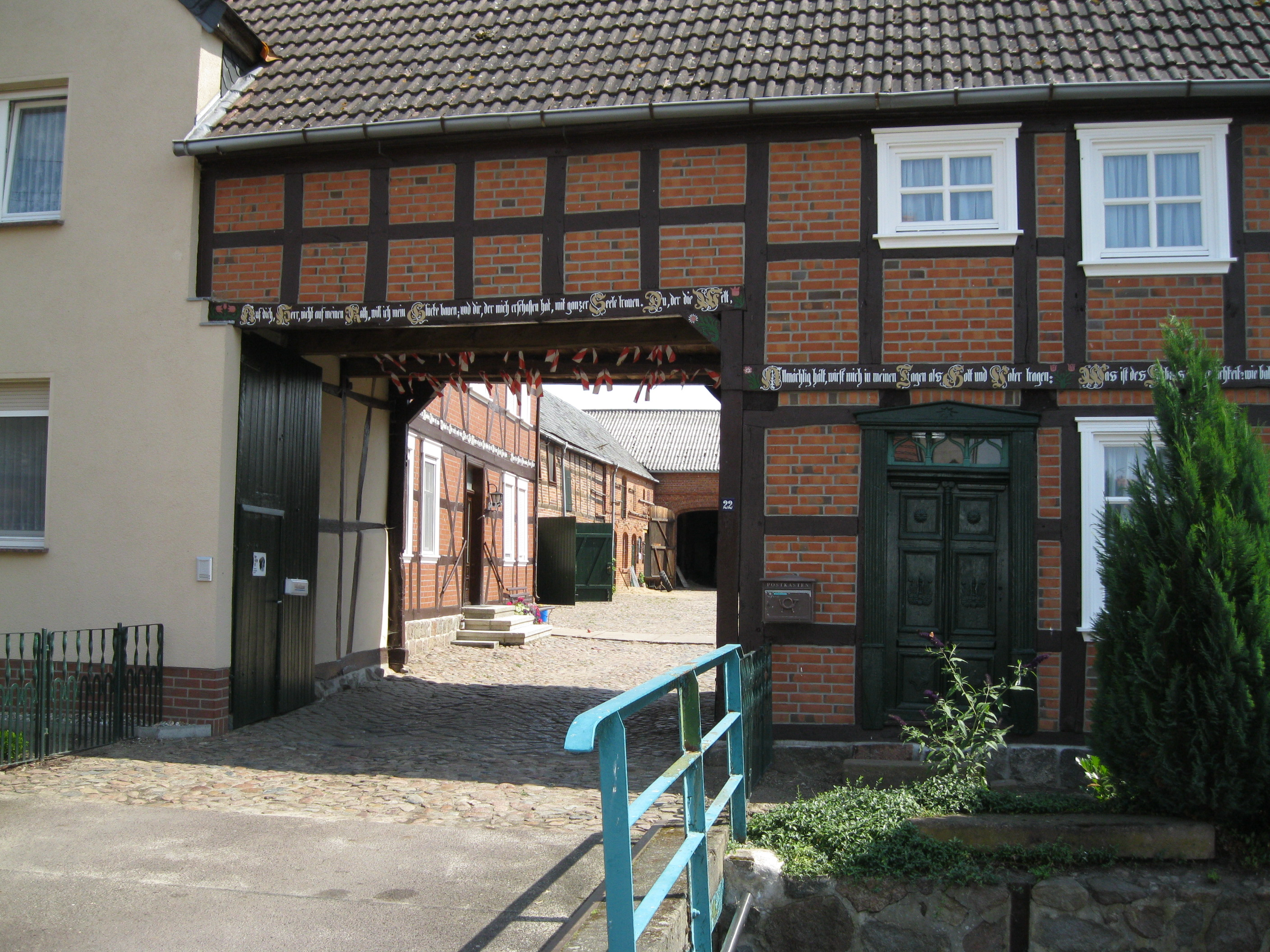 Torweg eines typischen altmärkischen Vierseithofes in Wollenhagen